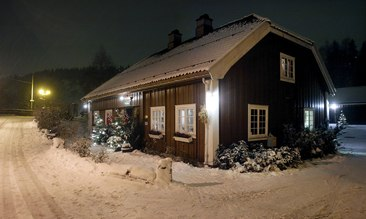 Værtshuset Bærums Verk ble oppført ca 1640 på Bærums Jern Werk i Bærum i Akershus.